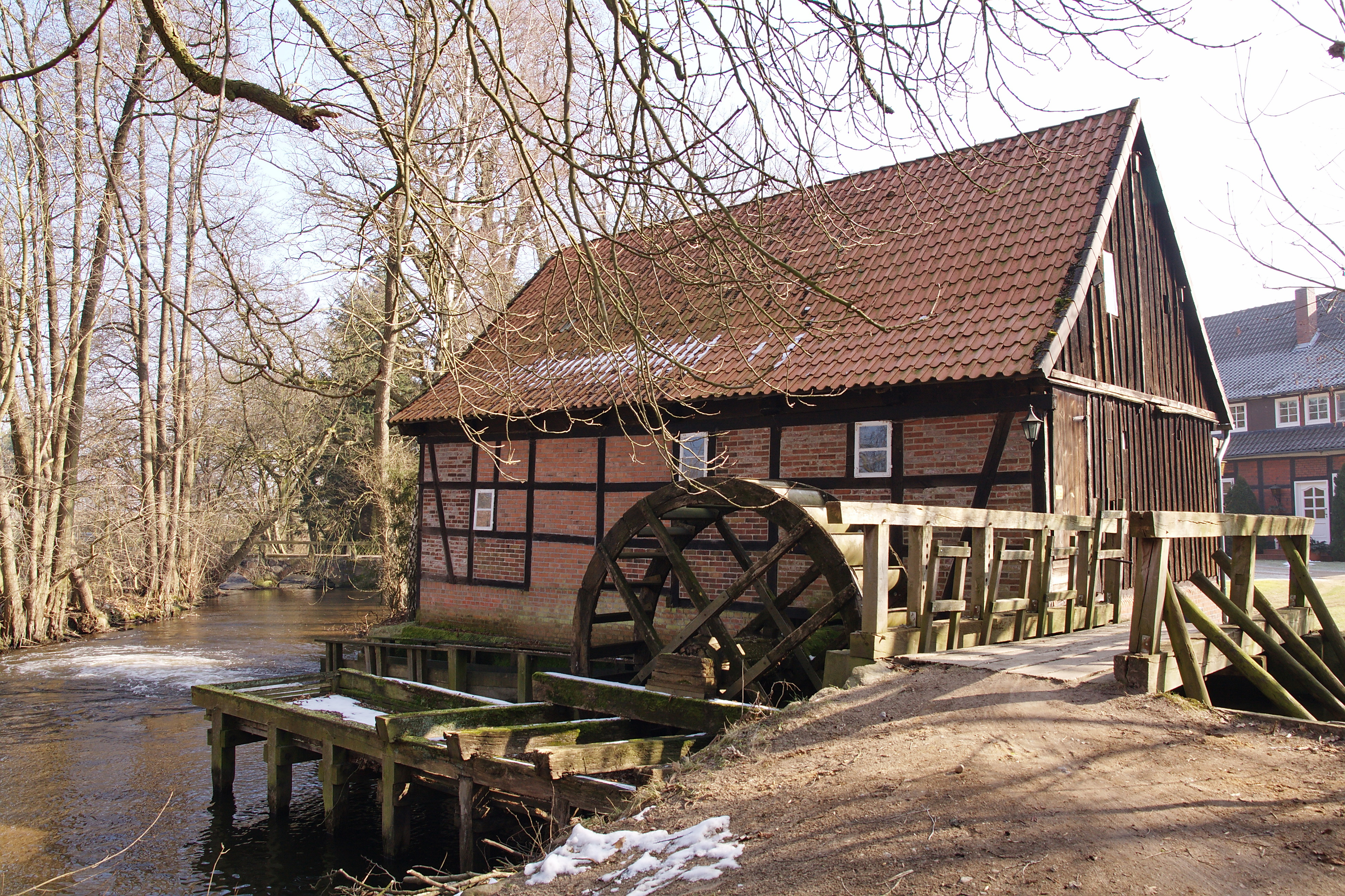 Wassermühle von Holxen (Suderburg), Niedersachsen, Deutschland